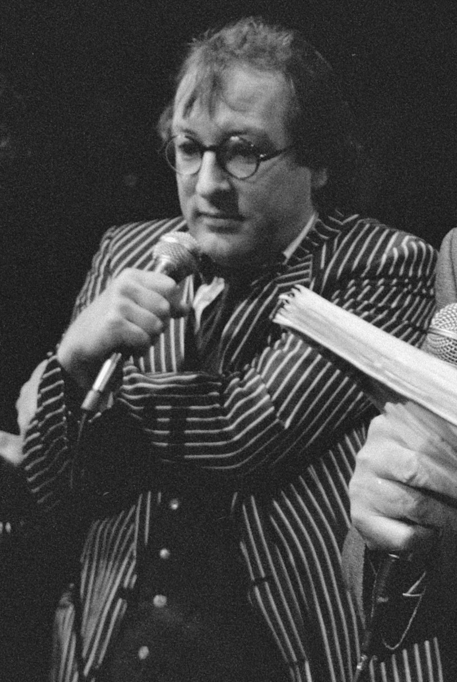 Actie Youp van t Hek in de Kleine Komedie i.v.m. sluiting; Youp van t Hek (l) in discussie met PvdA-raadslid Cnoop Koopmans